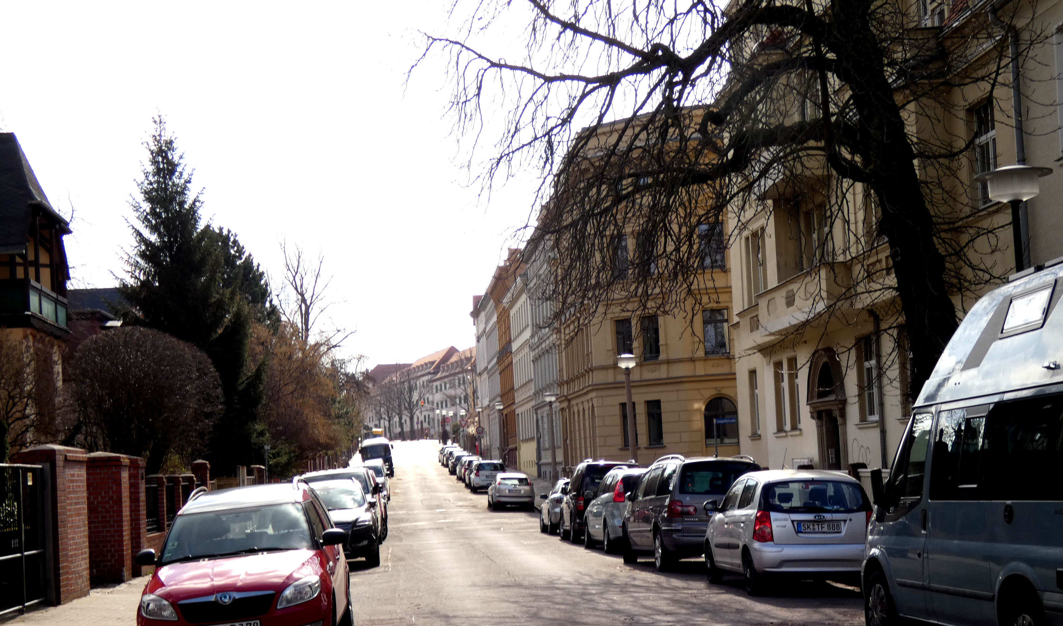 Fischer-von-Erlach-Straße, Blick nach Süden, Halle (Saale)